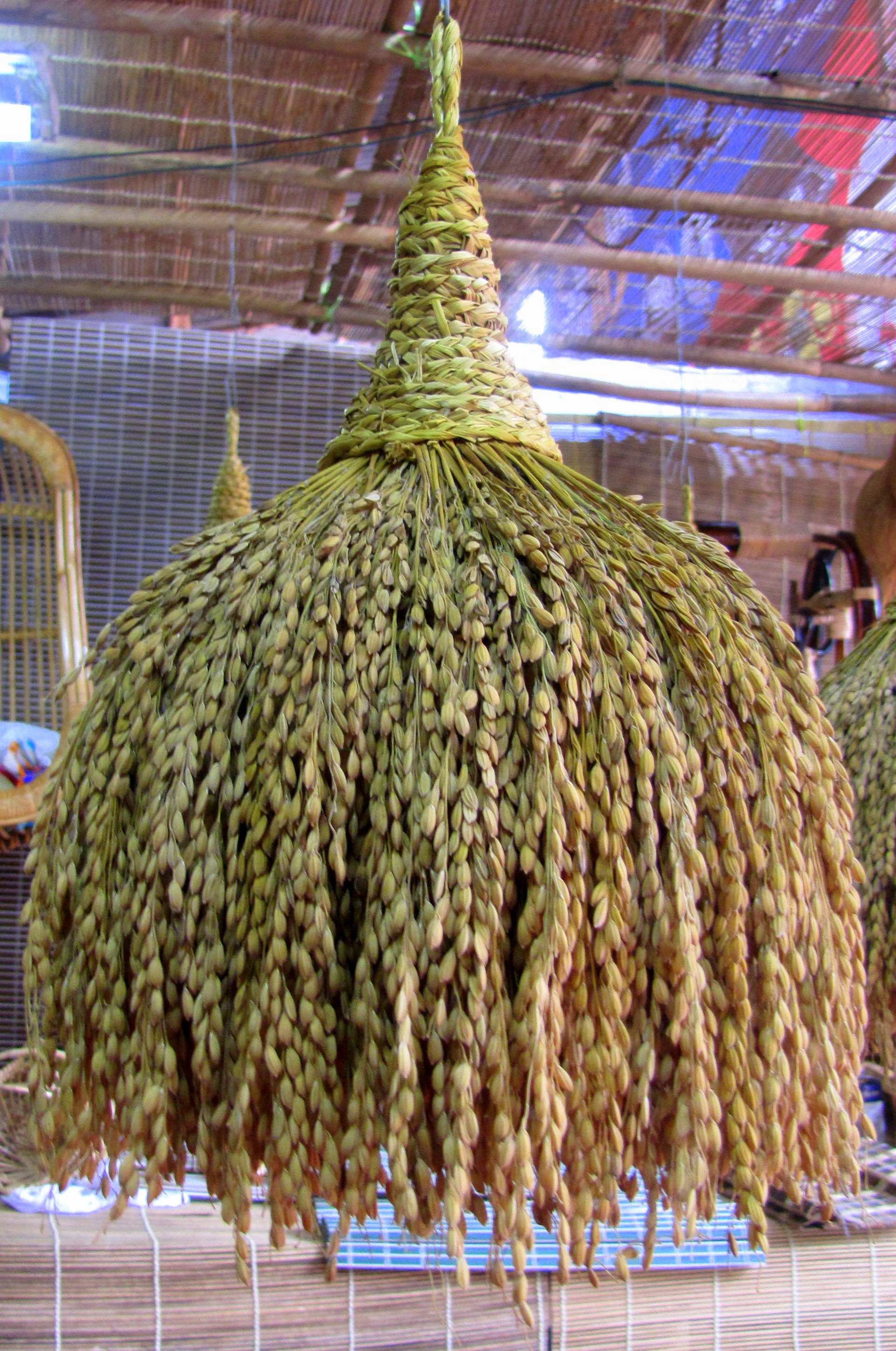 കാര്‍ഷിക സംസ്കാരത്തിന്റേയും ഐശ്വര്യത്തിന്റേയും സൂചകമായി കേരത്തിലെ വീടുകളില്‍ കാണുന്ന ഒന്നാണ് നെല്ലിന്‍ കതിര്‍ക്കുല. നെല്‍ക്കറ്റ പ്രത്യേക രീതിയില്‍ നെയ്താണ് ഇതുണ്ടാക്കുന്നത്.